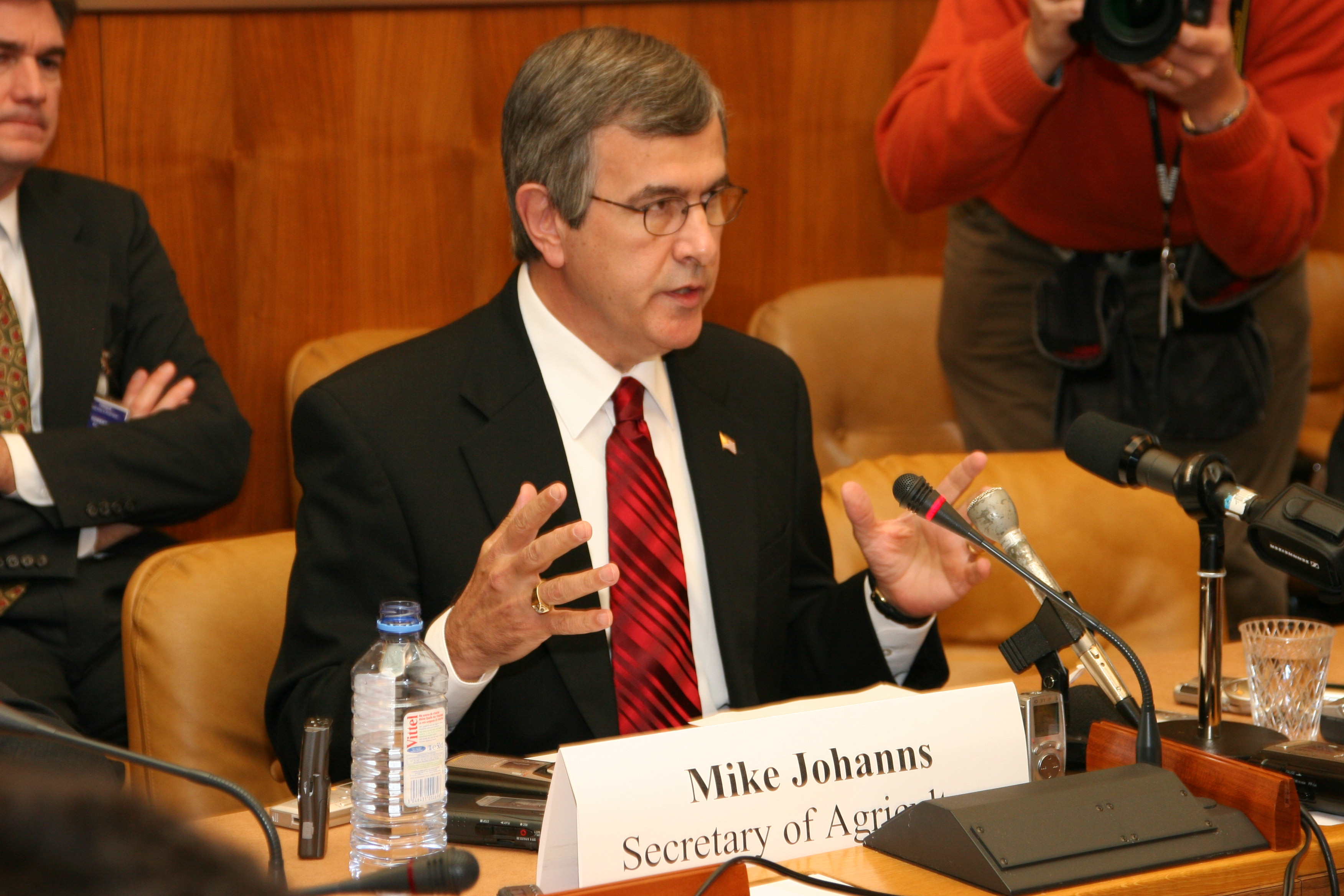 Mike Johanns